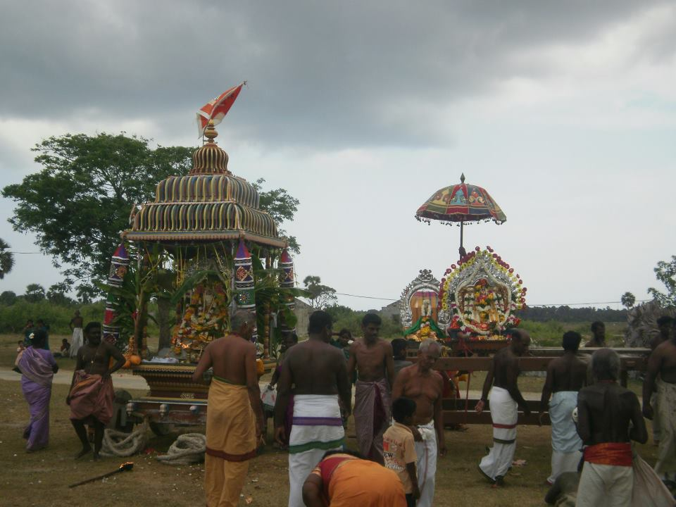 தேர்